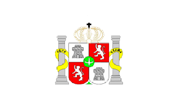 Bandera de la ciudad de Villarrica, Py